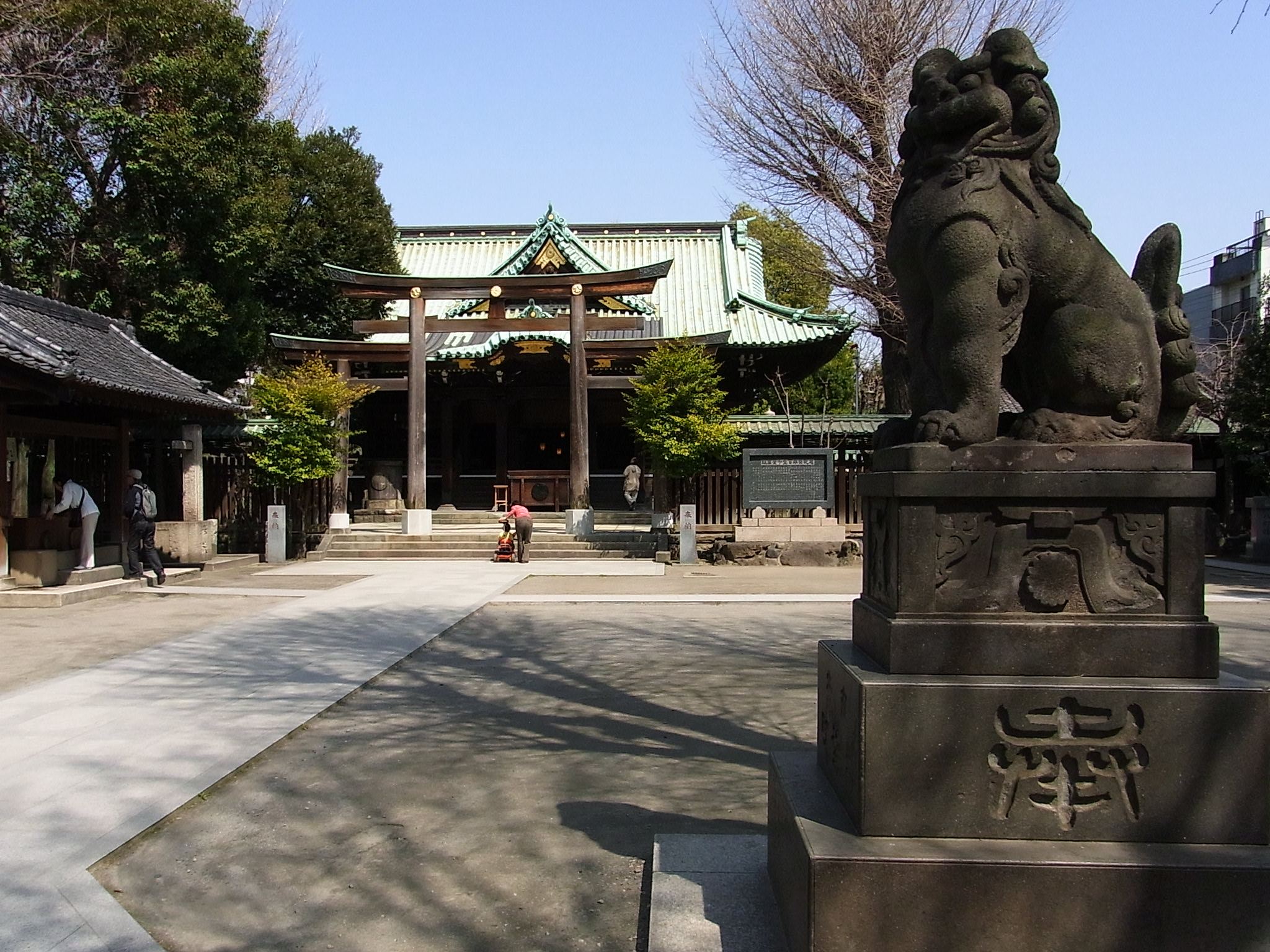 墨田区 牛島神社